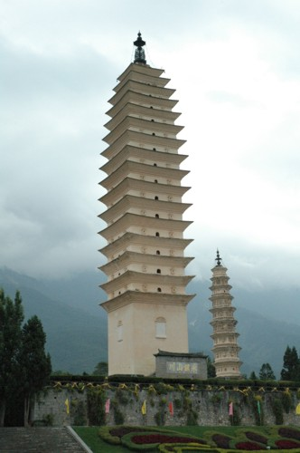 Las tres pagodas (Dali)